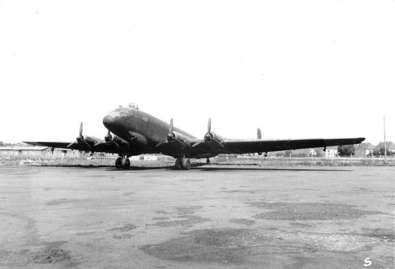 Junkers Ju 290 A-3, Fernaufklärer Werkfoto Junkers (MBB) 290/8